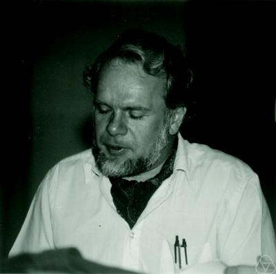 Foto di Michiel Hazewinkel